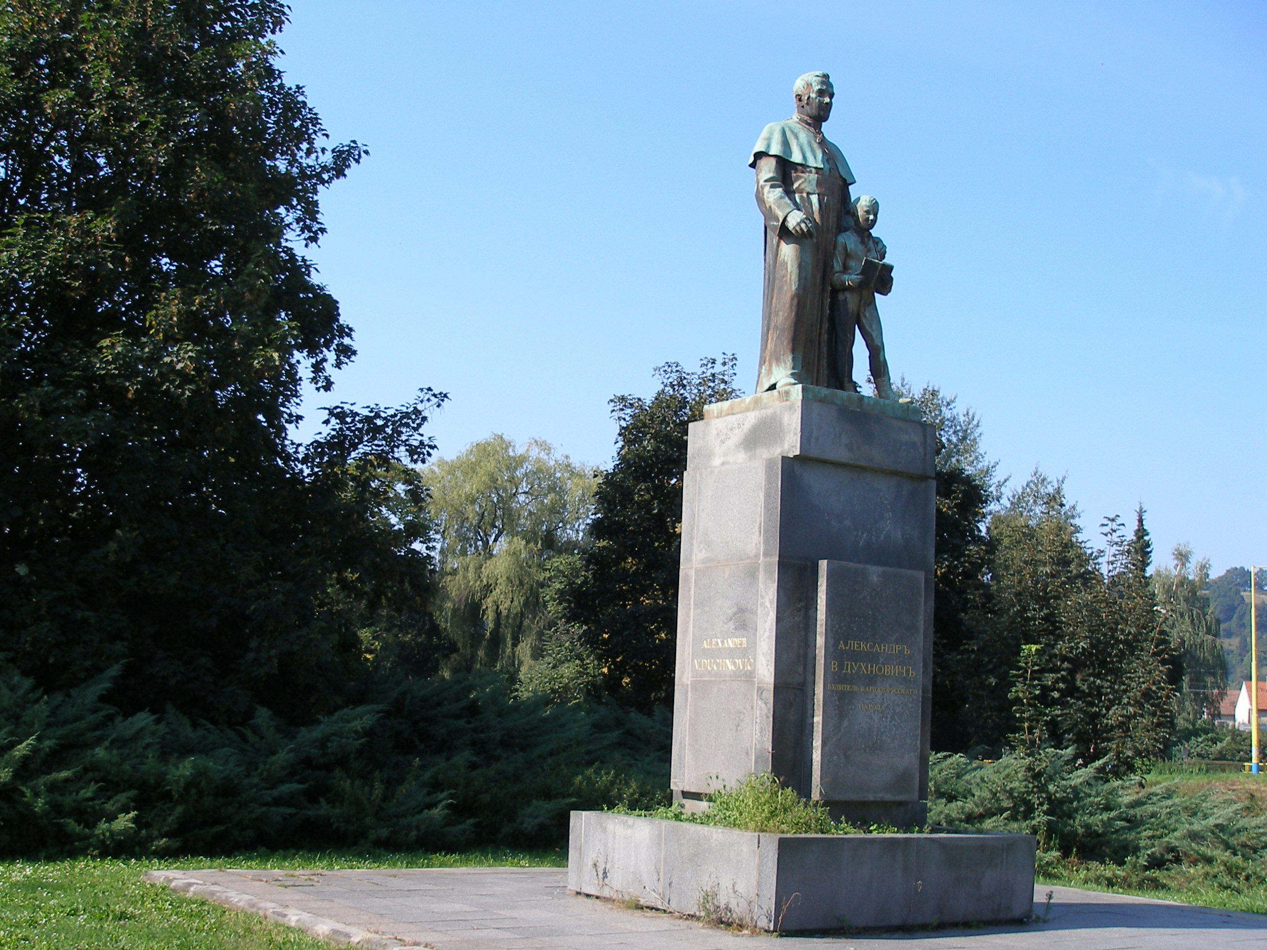 Prešov socha A.Duchnoviča pri rieke Torysa